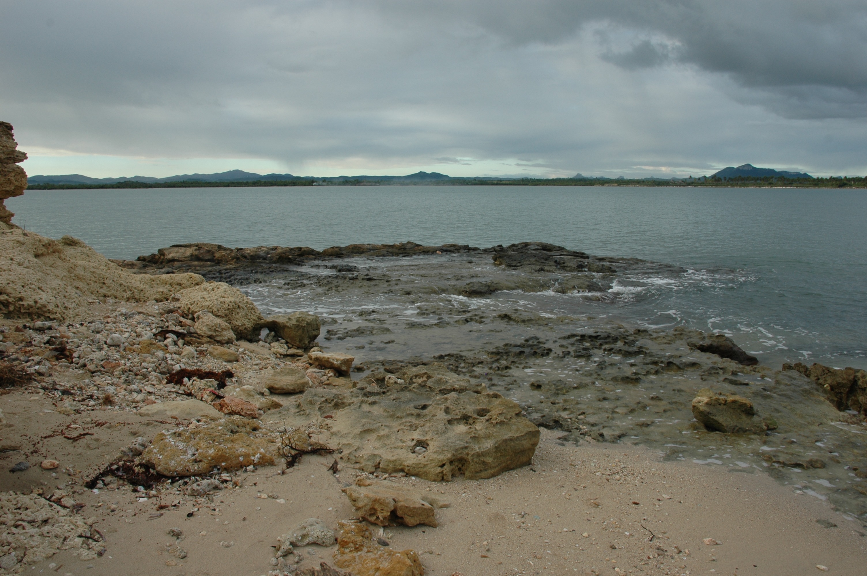 Lugar donde por primera vez Colon toco suelo en el nuevo mundo